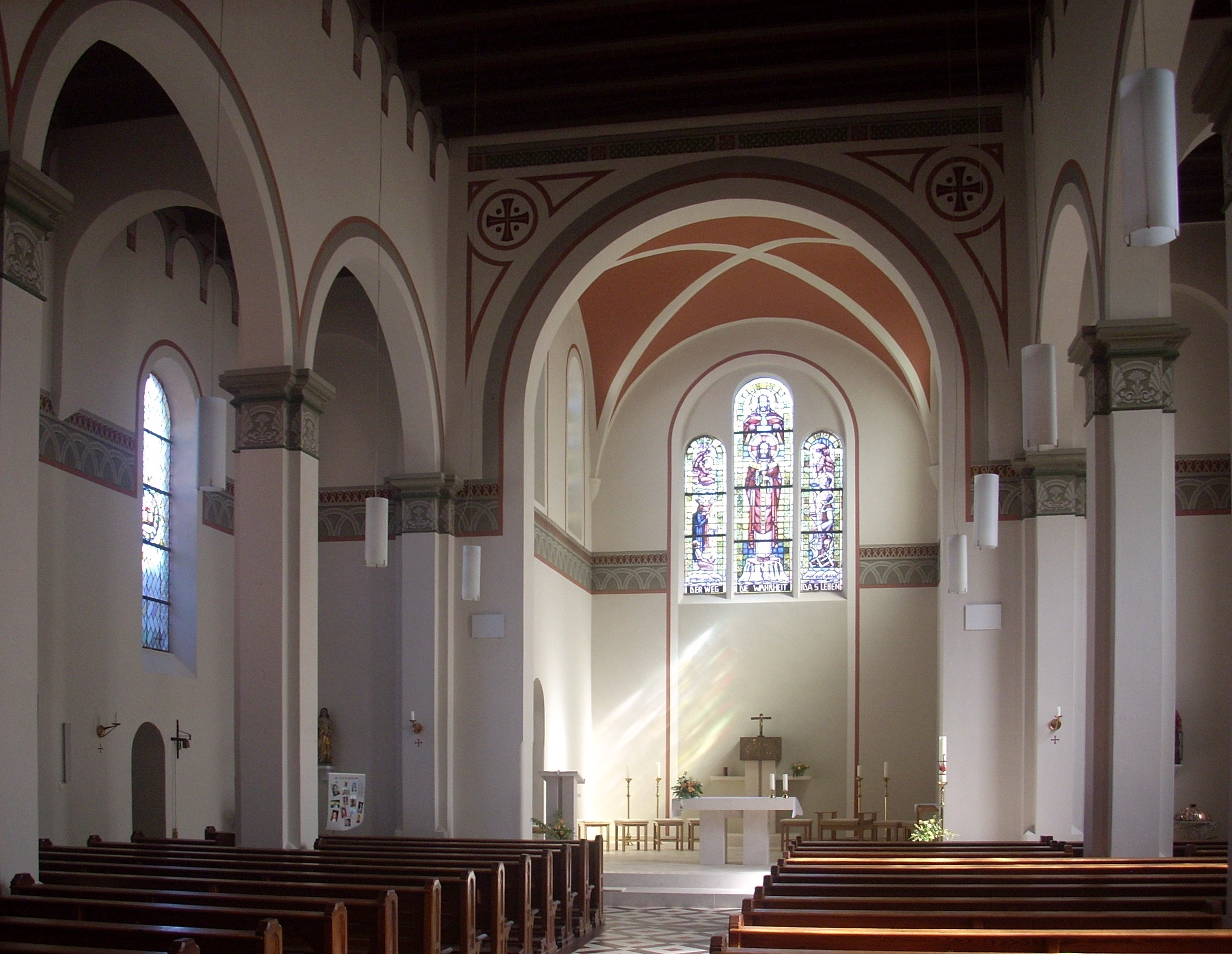 Wismar, Kath. Kirche St. Laurentius, Inneres